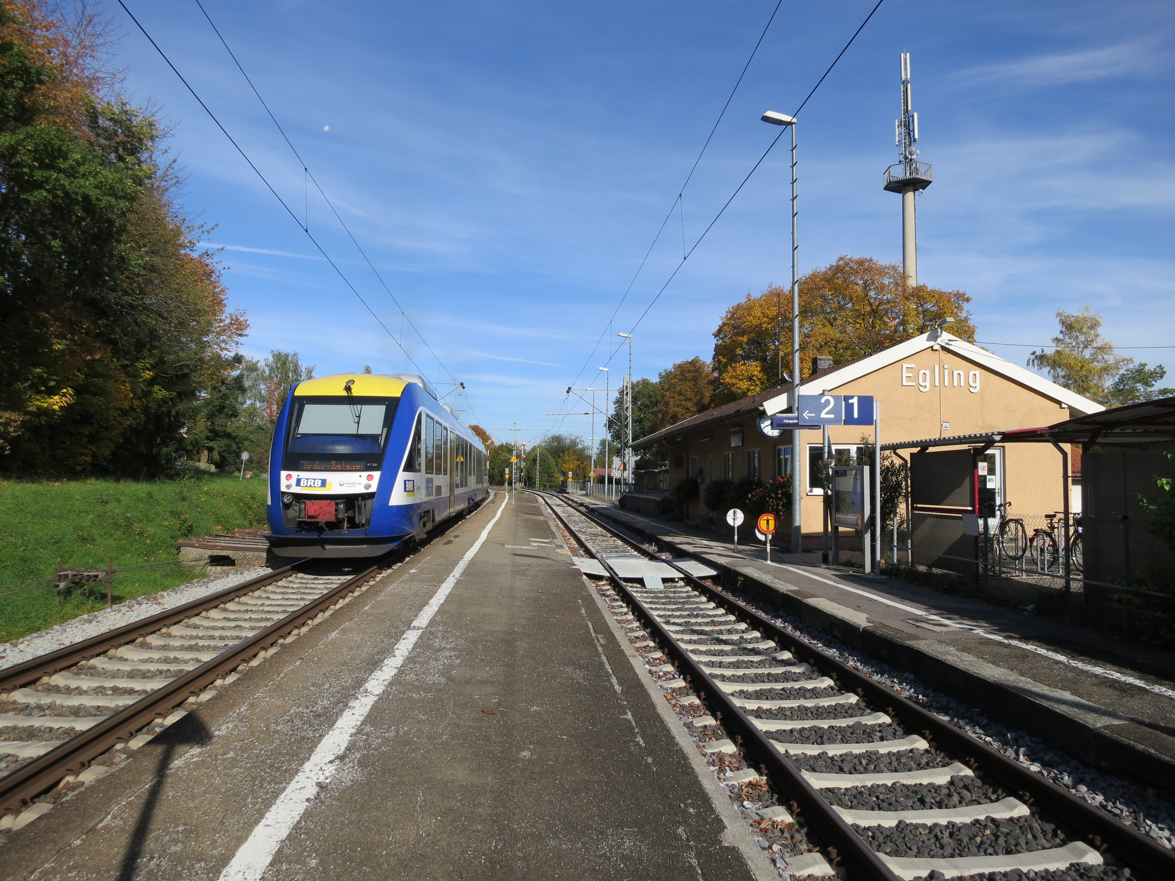 Bahnsteige und Empfangsgebäude des Bahnhofs Egling an der Ammerseebahn mit LINT-Triebwagen der BRB